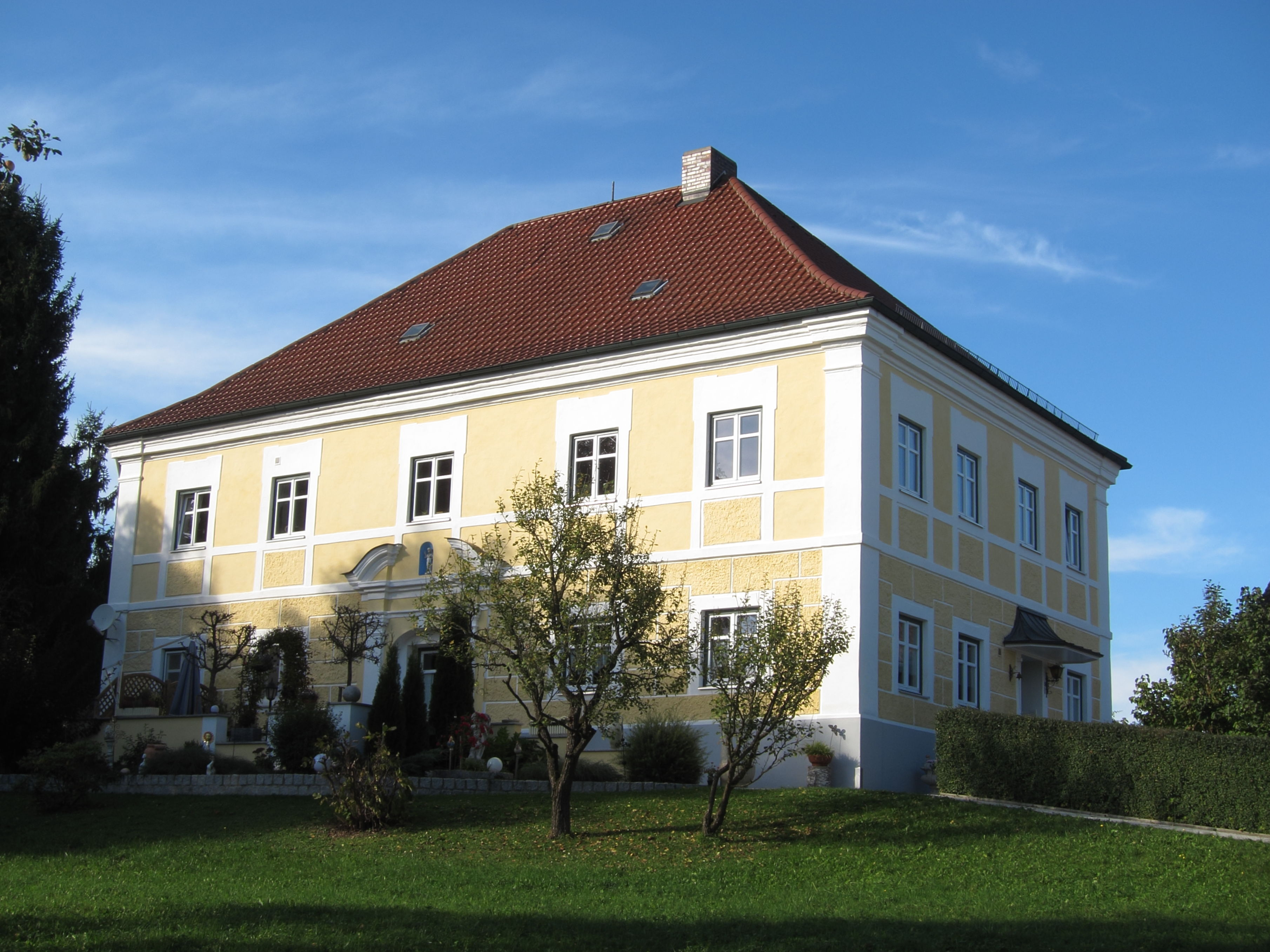 Pirka; Ehem. Schloss, zweigeschossiger Walmdachbau mit Putzgliederung, Ende 17. Jahrhundert.